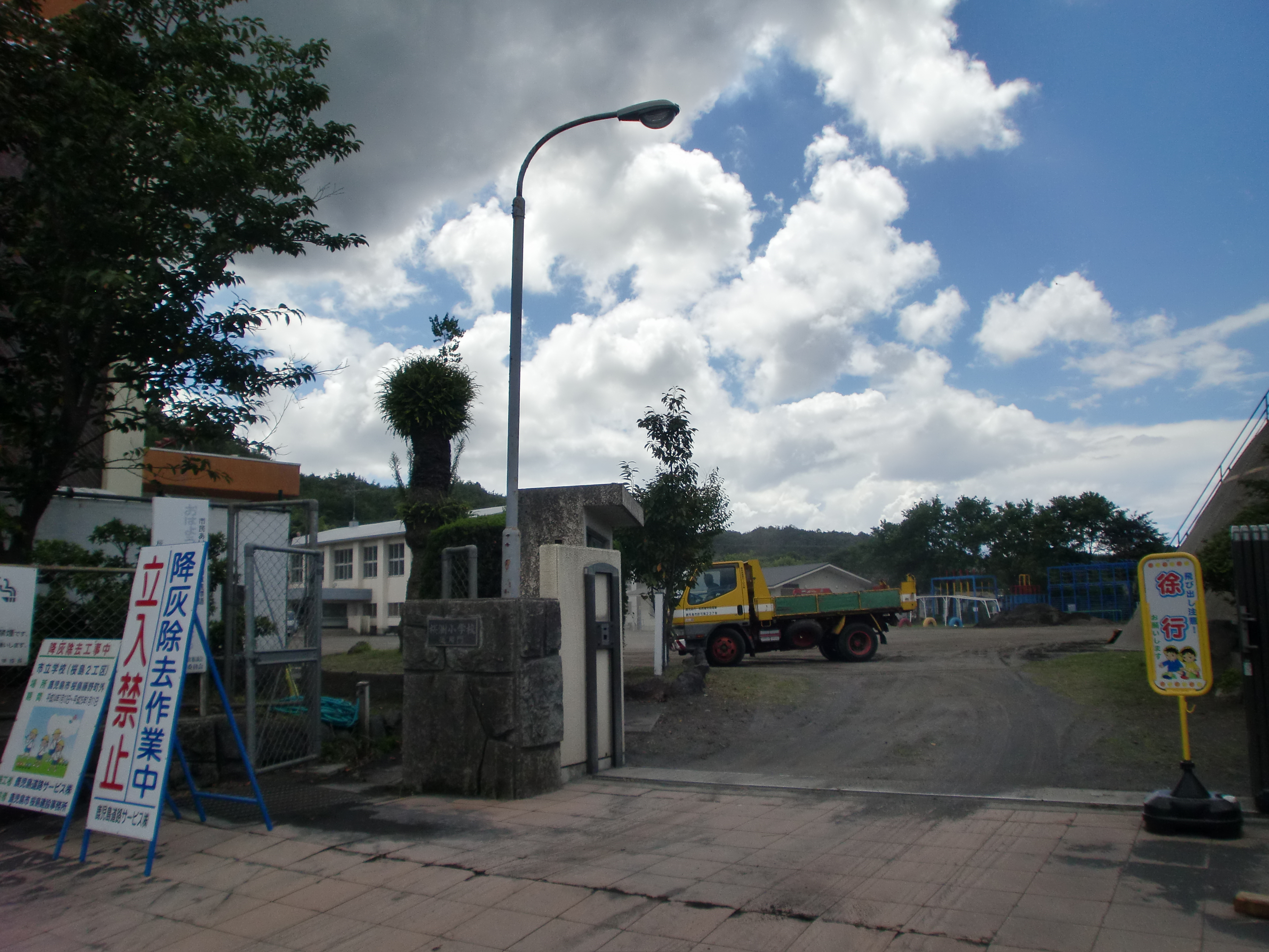 鹿児島市立桜洲小学校の外観（降灰除去工事中であったため工事車両有）。